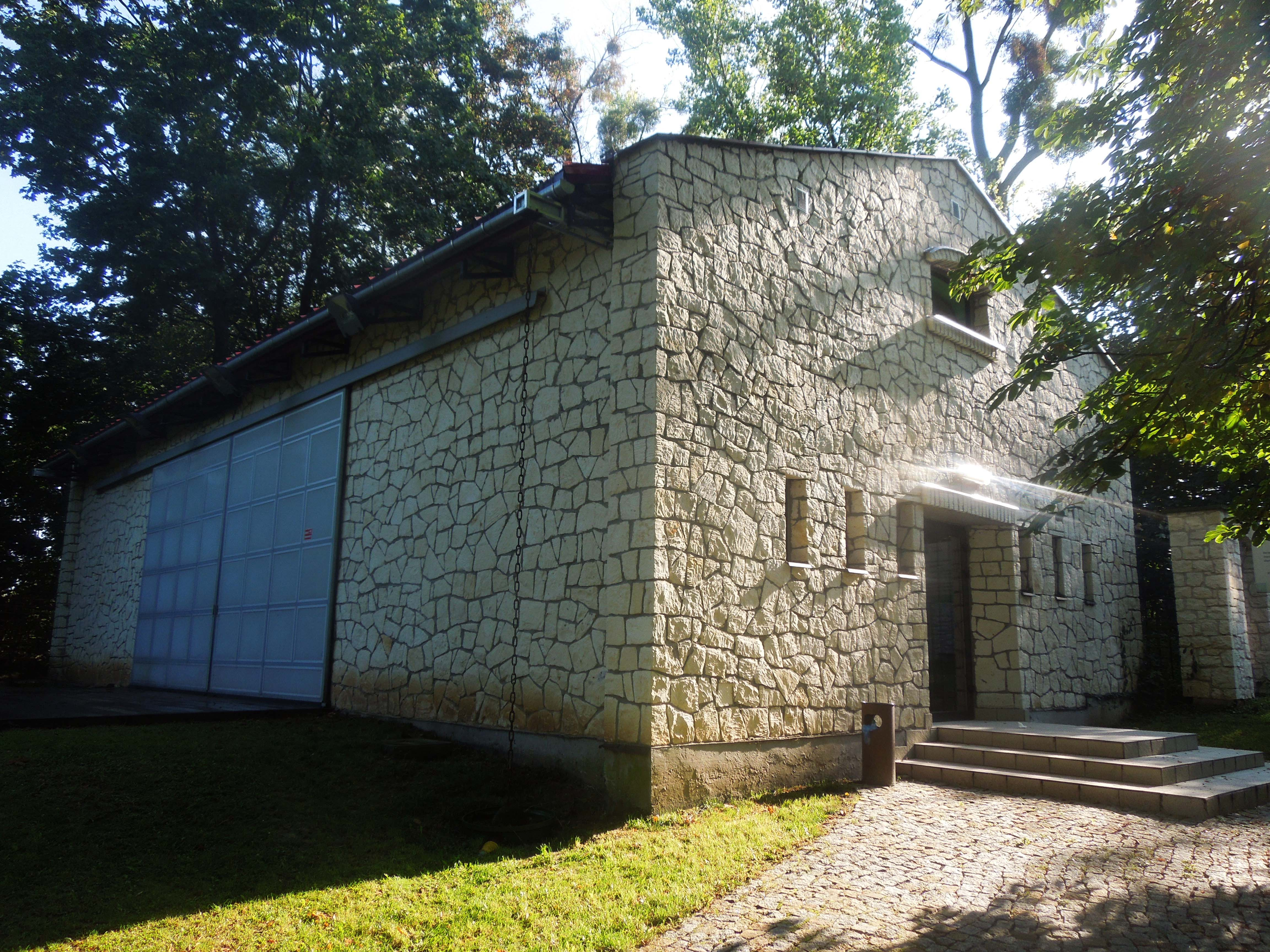 Gardzienice - Szopa